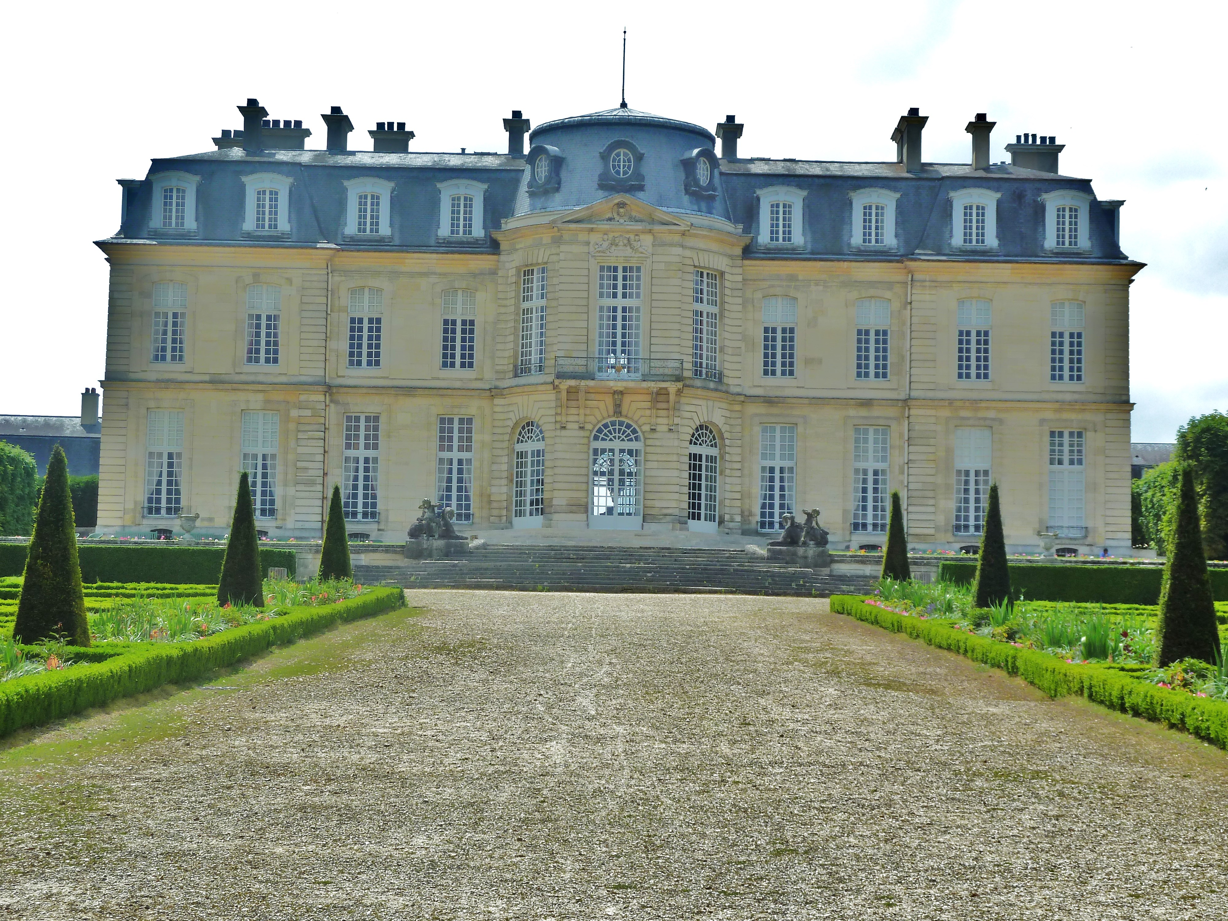 Château de Champs-sur-Marne, vom Schlosspark aus gesehen Architect: Jean-Baptiste Bullet de Chamblain (1665–1726) Description French draughtsman and architect son of Pierre Bullet student of Pierre BulletDate of birth/death16651726Location of birth/deathParisParisWork locationFranceAuthority control VIAF: 64924791 LCCN: nb2007022493 GND: 123841054 ULAN: 500091326 ISNI: 0000 0000 6683 7146 WorldCat